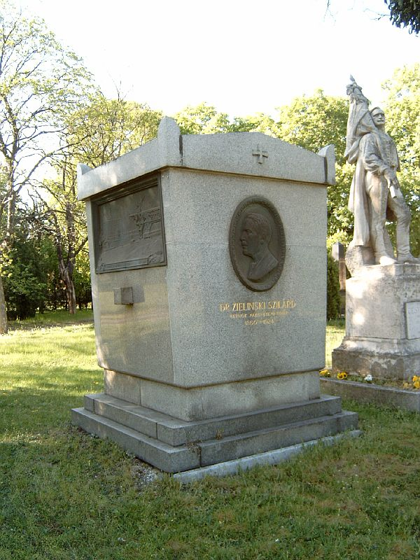 Zielinski Szilárd sírja Budapesten. Bory Jenő szobrászművész és Wälder Gyula építész alkotása. Kerepesi temető: 10/1-1-2.